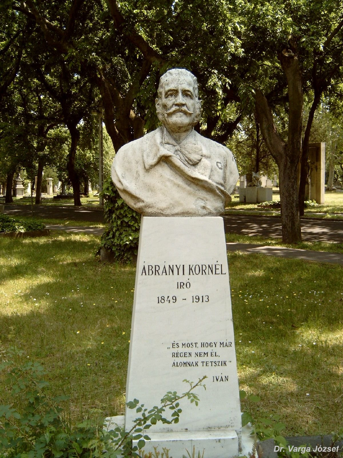 Ábrányi Kornél, ifj. sírja Budapesten. Kerepesi temető: 10-1-1